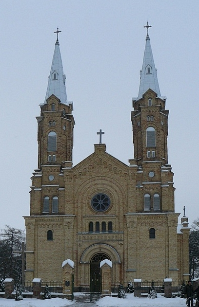 Костёл св. Михаила Архангела (фасад), Белогруда, Лидский район, Фото путешествия по Беларуси.